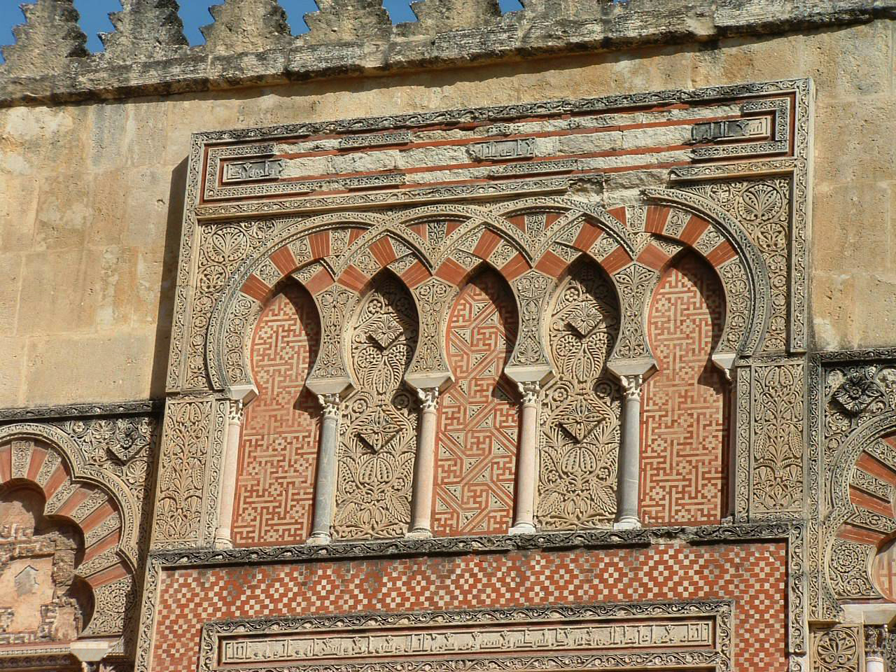 eigen foto, genomen op 2/11/2006